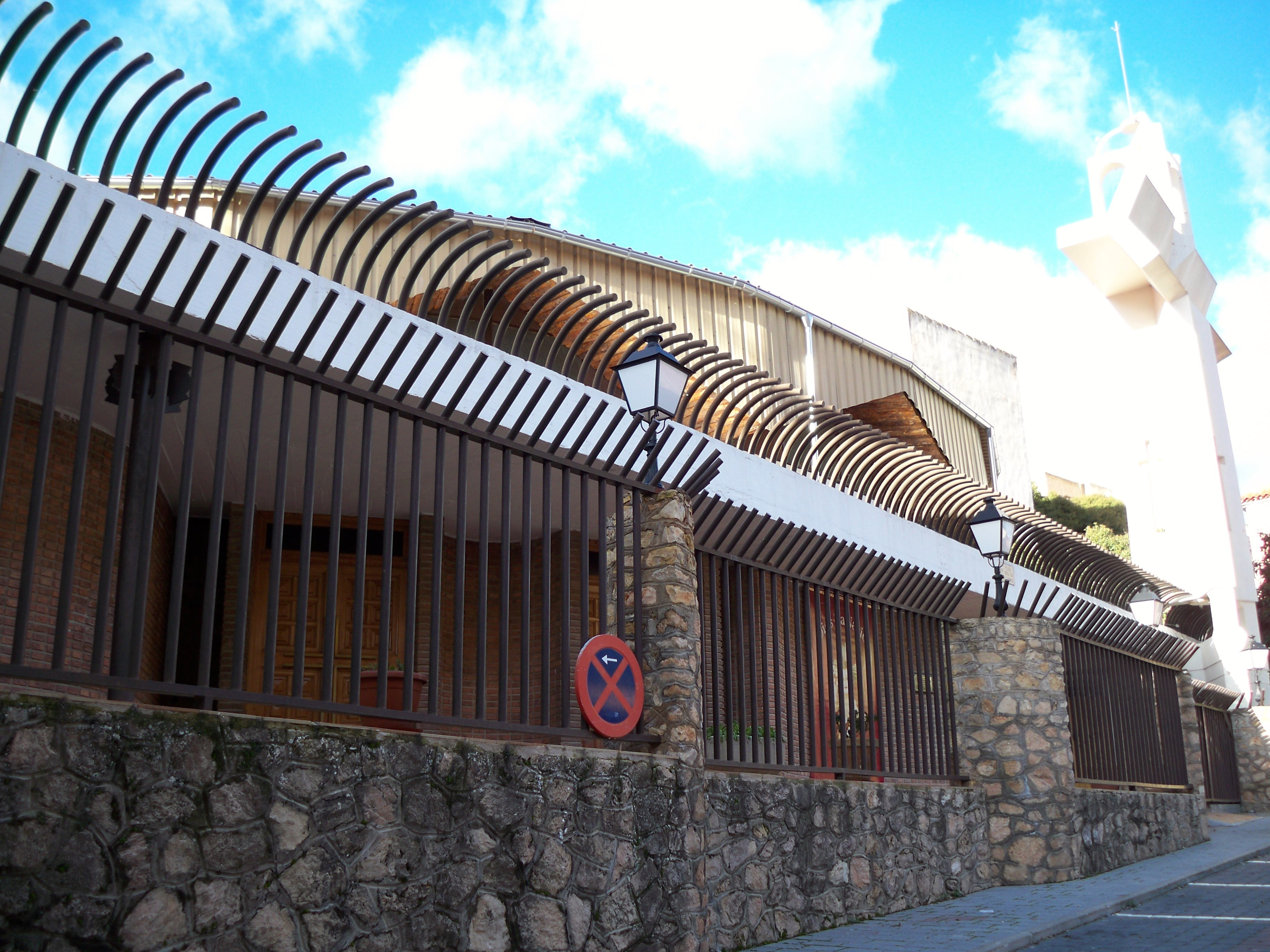 Fotografía de la fachada principal de la Iglesia de Nuestra Señora del Carmen de Molinicos (Albacete)